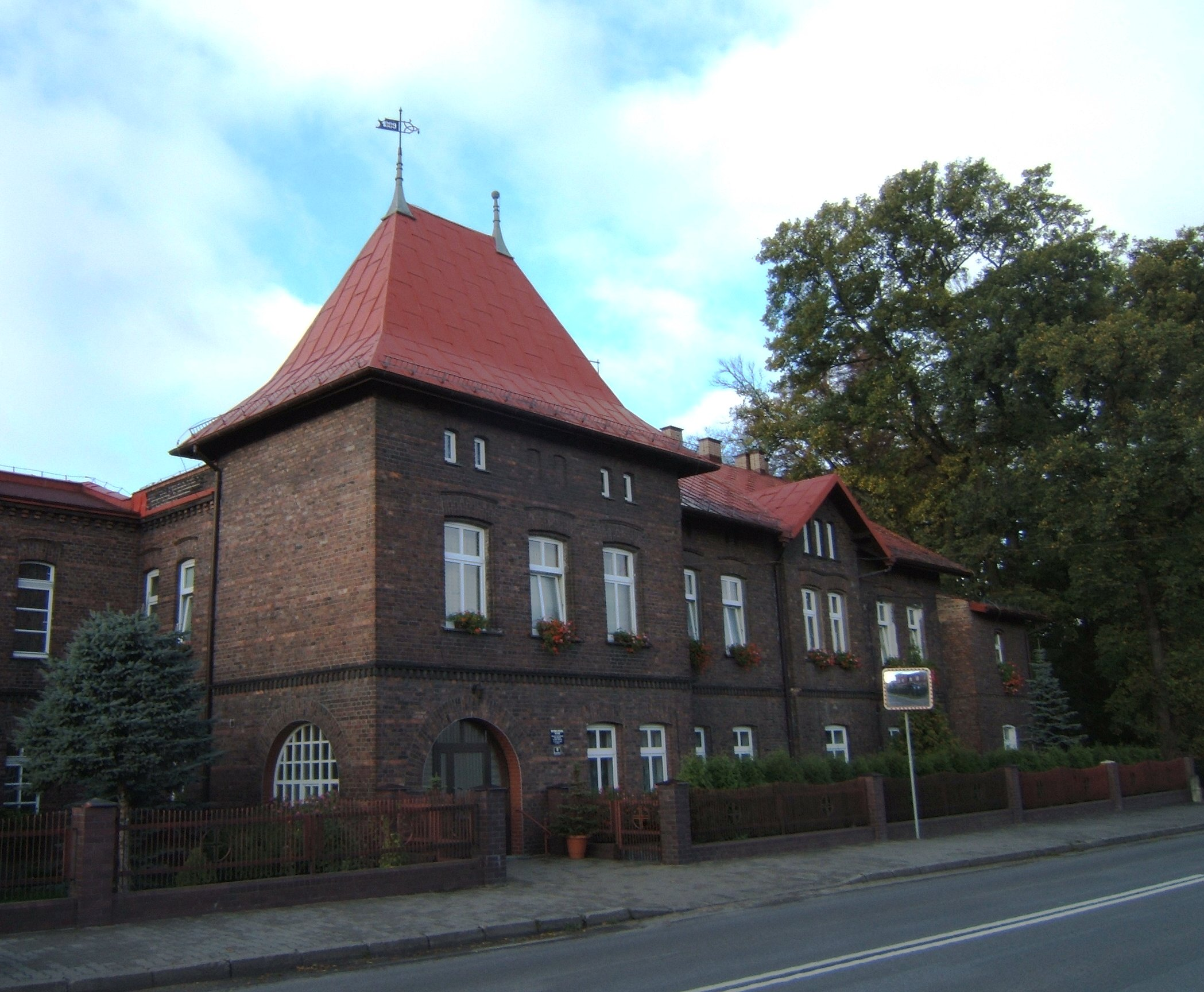 Dom opieki społecznej w Nakle Śląskim, Polska.